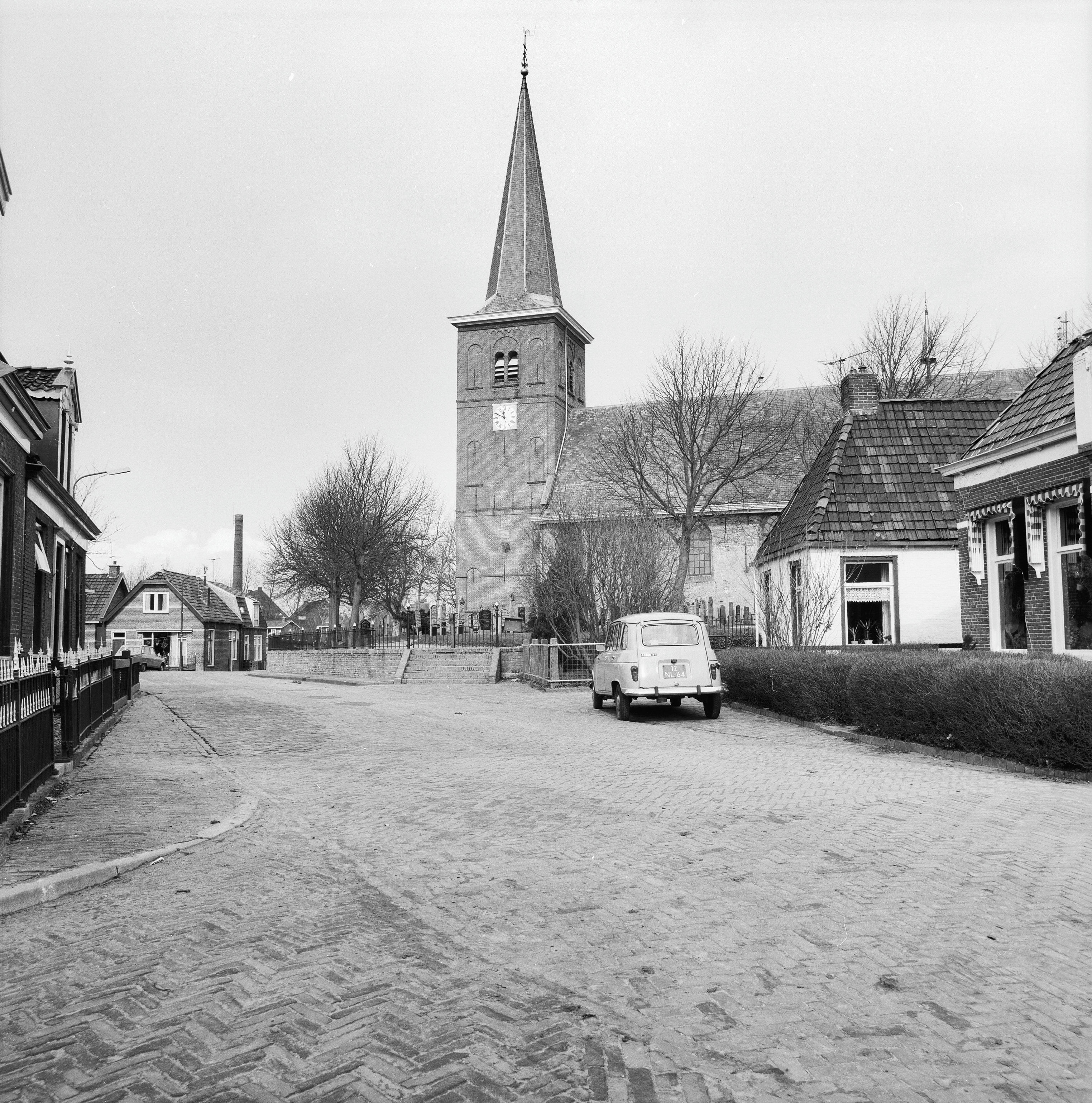 Nederlands Hervormde Kerk: overzicht zuid-zijde